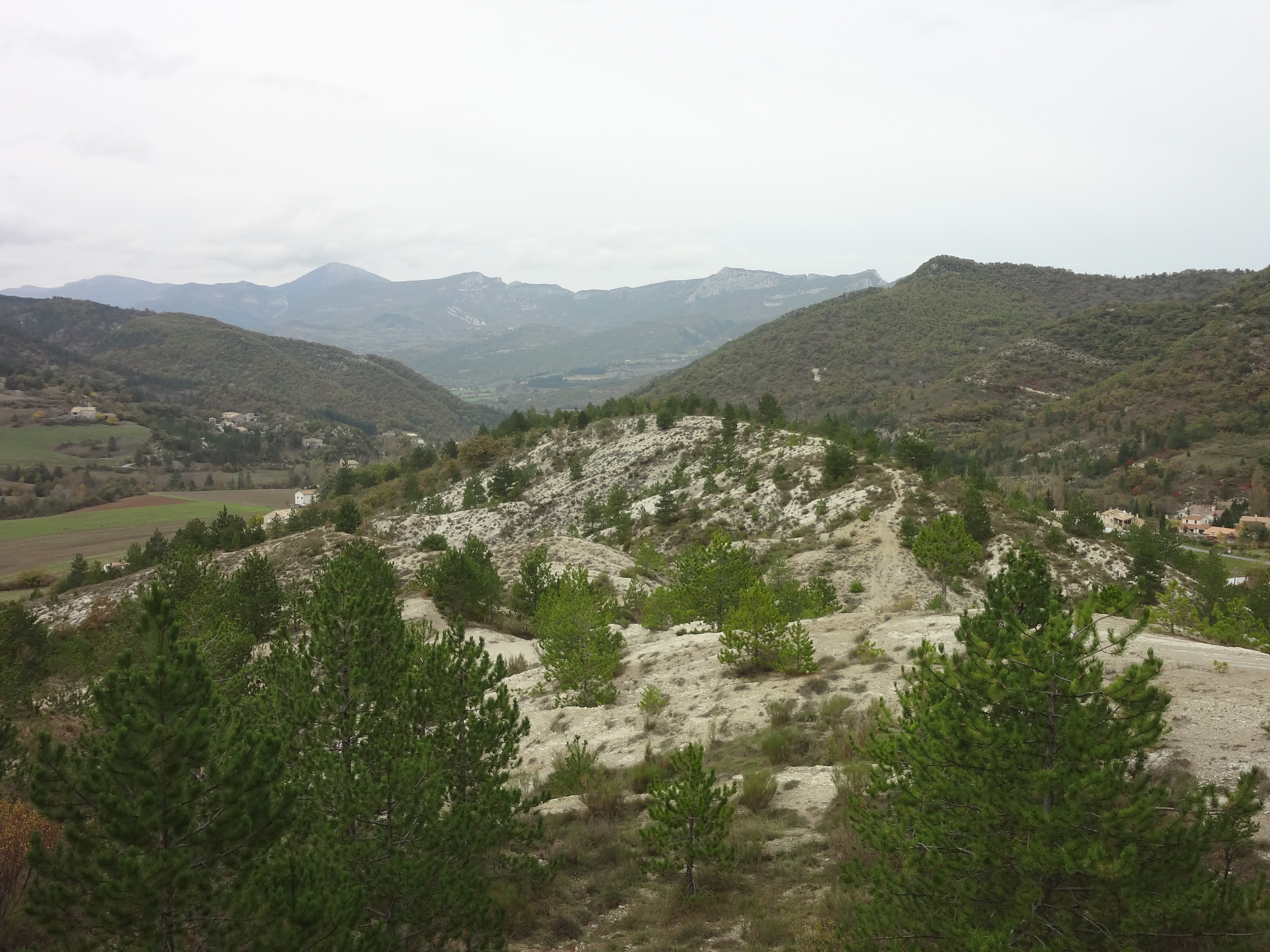 Où se situe la chapelle Saint-Honorat